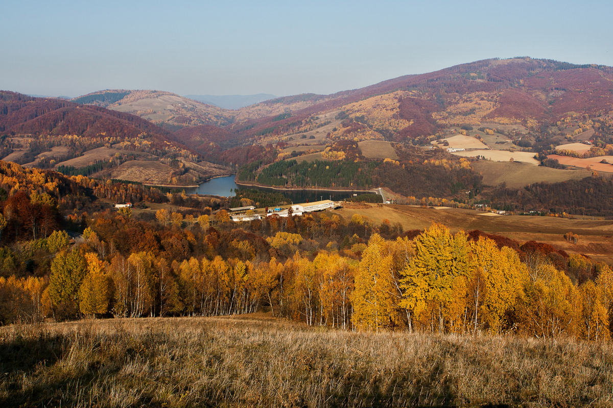 Jeseň v Klenovci